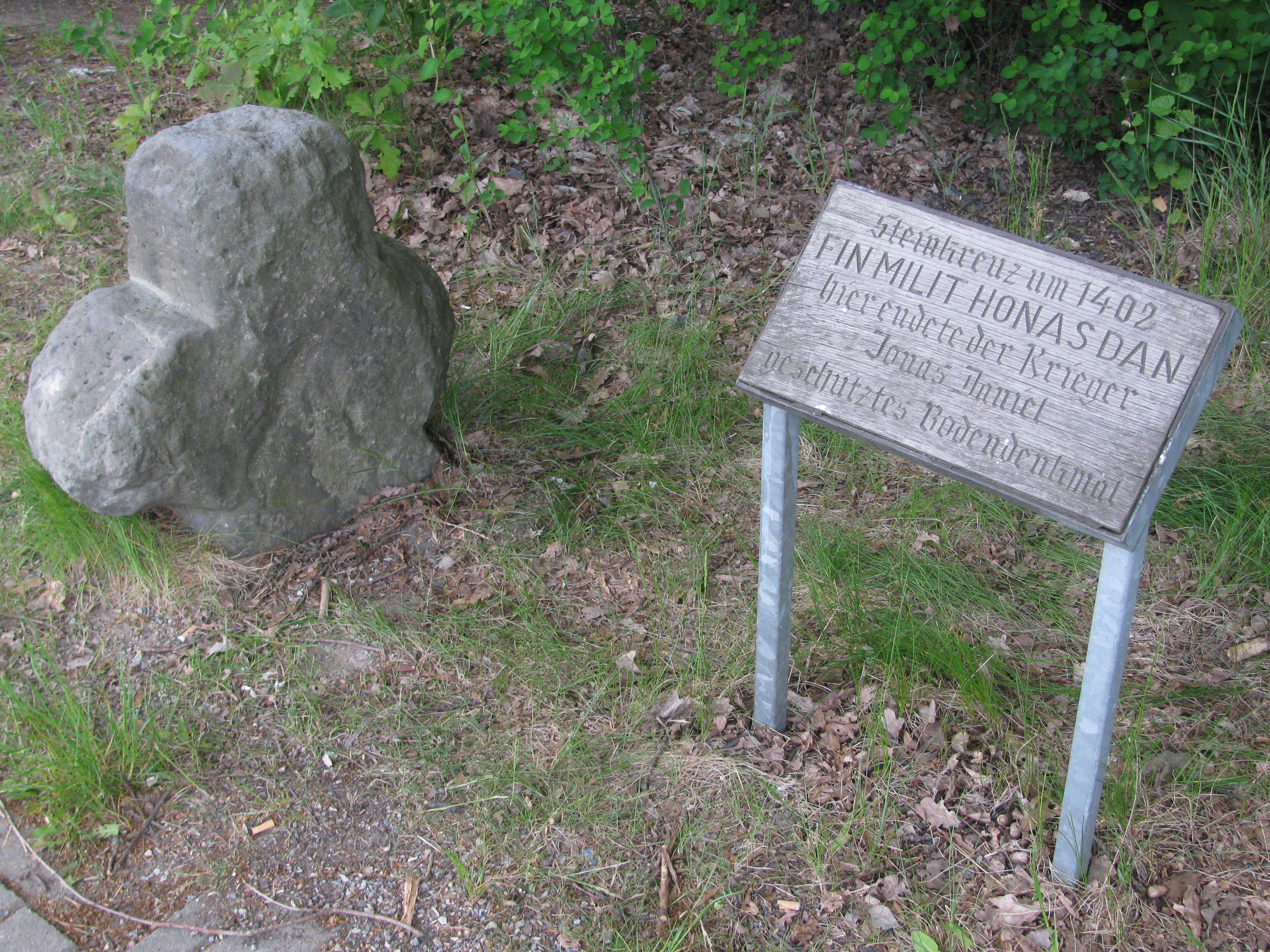 Jonaskreuz, Dresden, Gemarkung Hellerberge, Königsbrücker Str./Ecke Moritzburger Weg, mit nebenstehender Erläuterungstafel